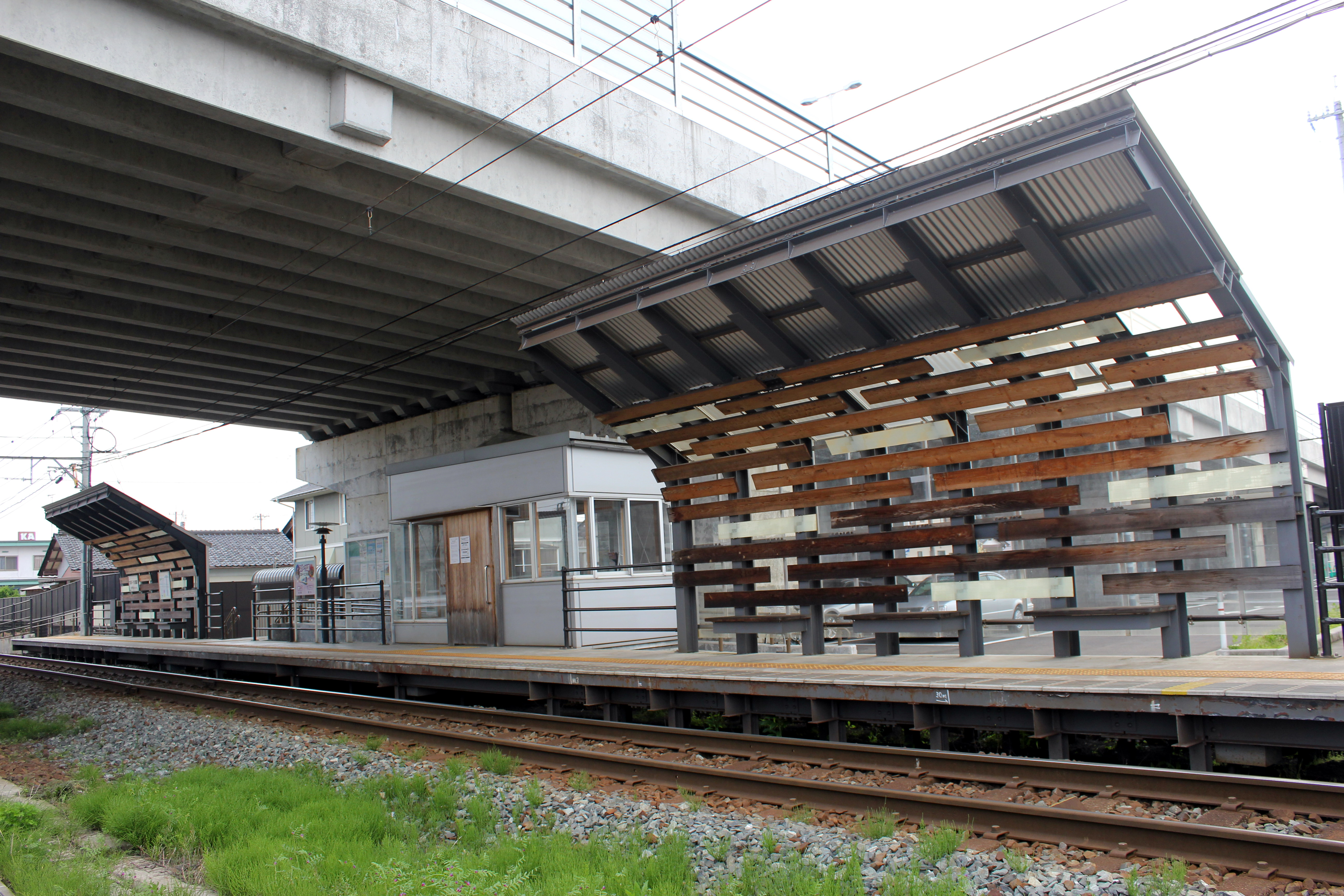 スポーツ公園駅（福井鉄道）